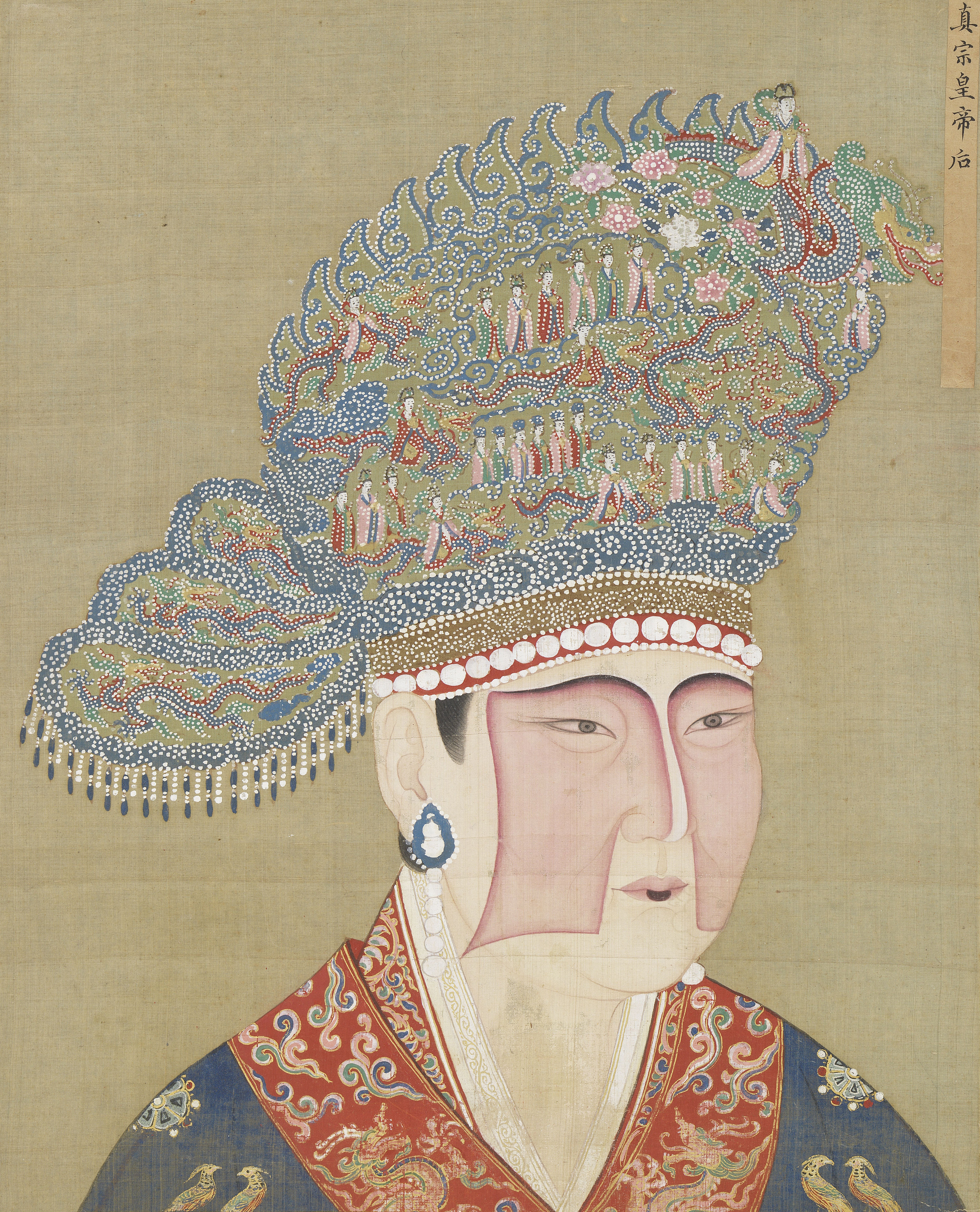 宋代后半身像 冊 真宗后